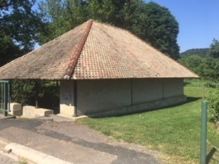 Le lavoir d'Humberville